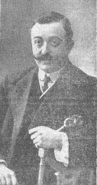 Retrato de Antonio Casero en las páginas de El Heraldo de Madrid.